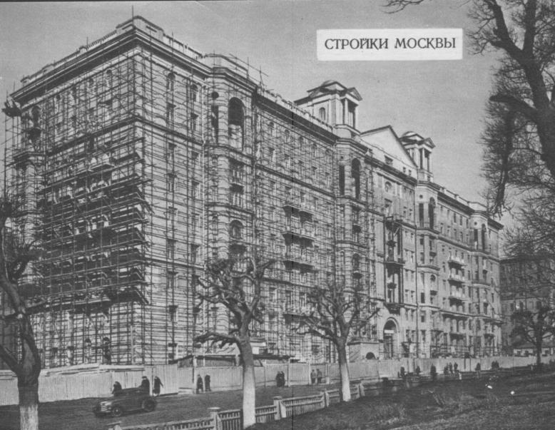 Строительство дома №46-48 по улице Чкалова